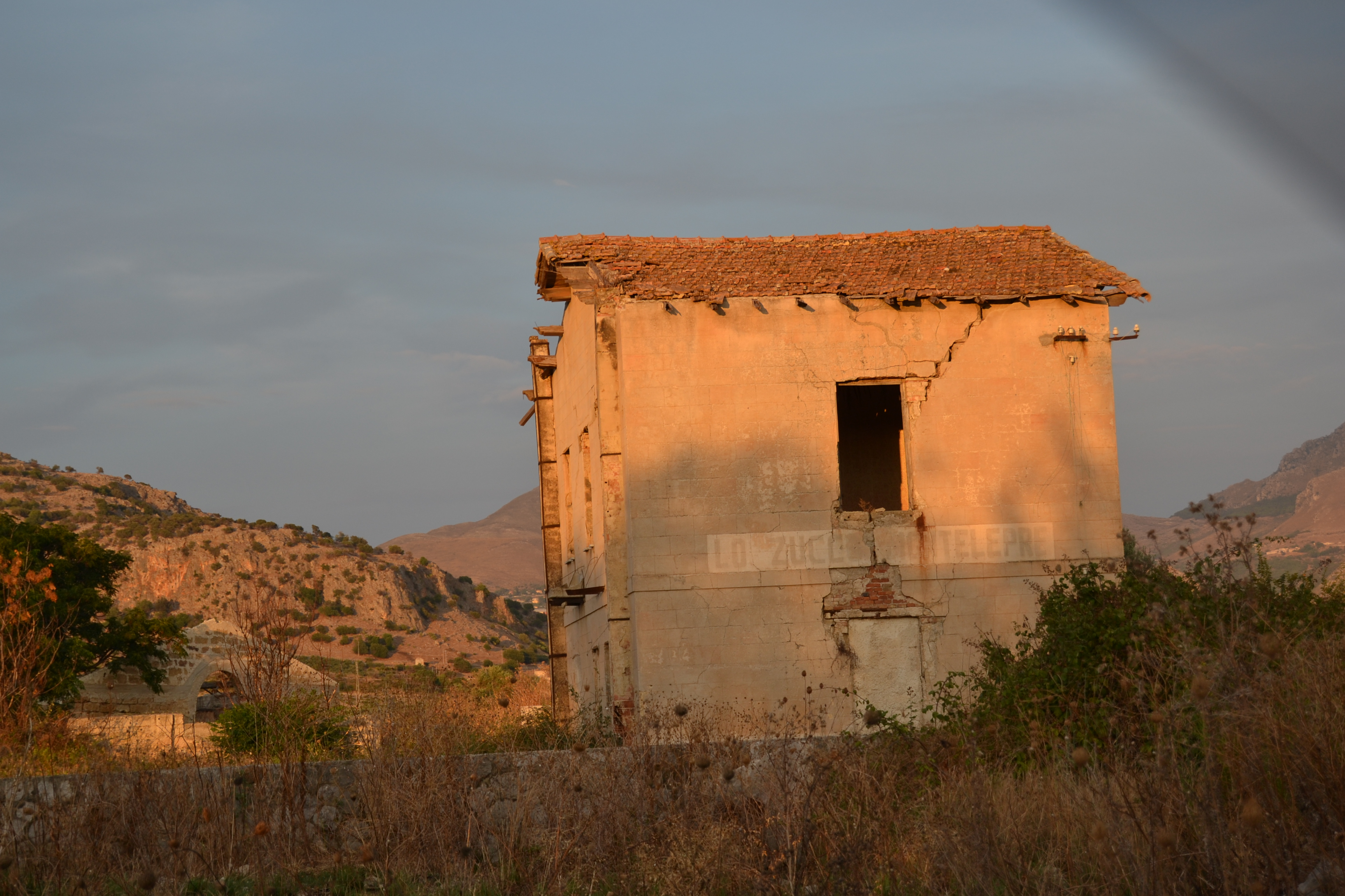 Casello abbandonato